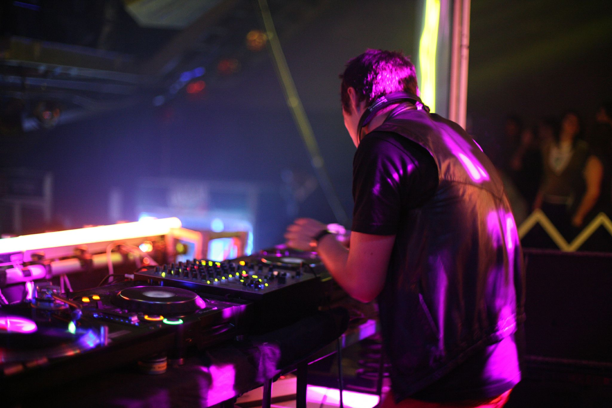 Australian DJ Ajax.